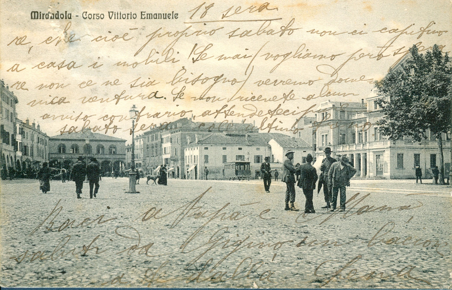 Mirandola - Corso Vittorio Emanuele